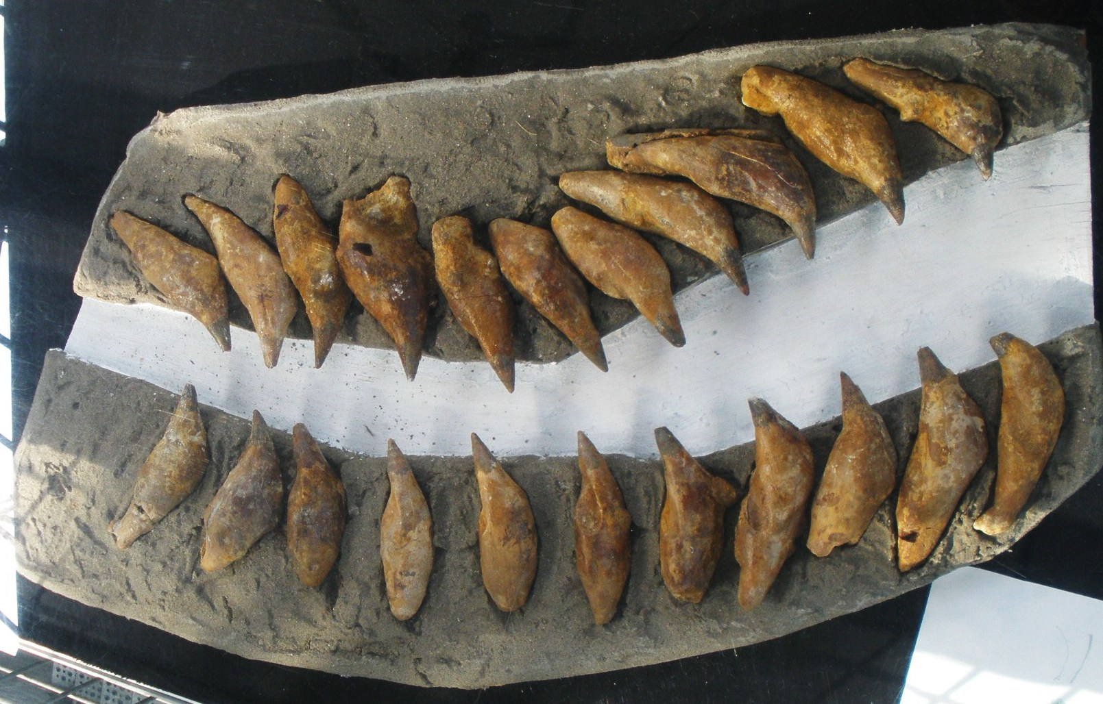 Fossil of Acrophyseter, an extinct sperm whale- Took the photo at De Groene Poort, Boxtel